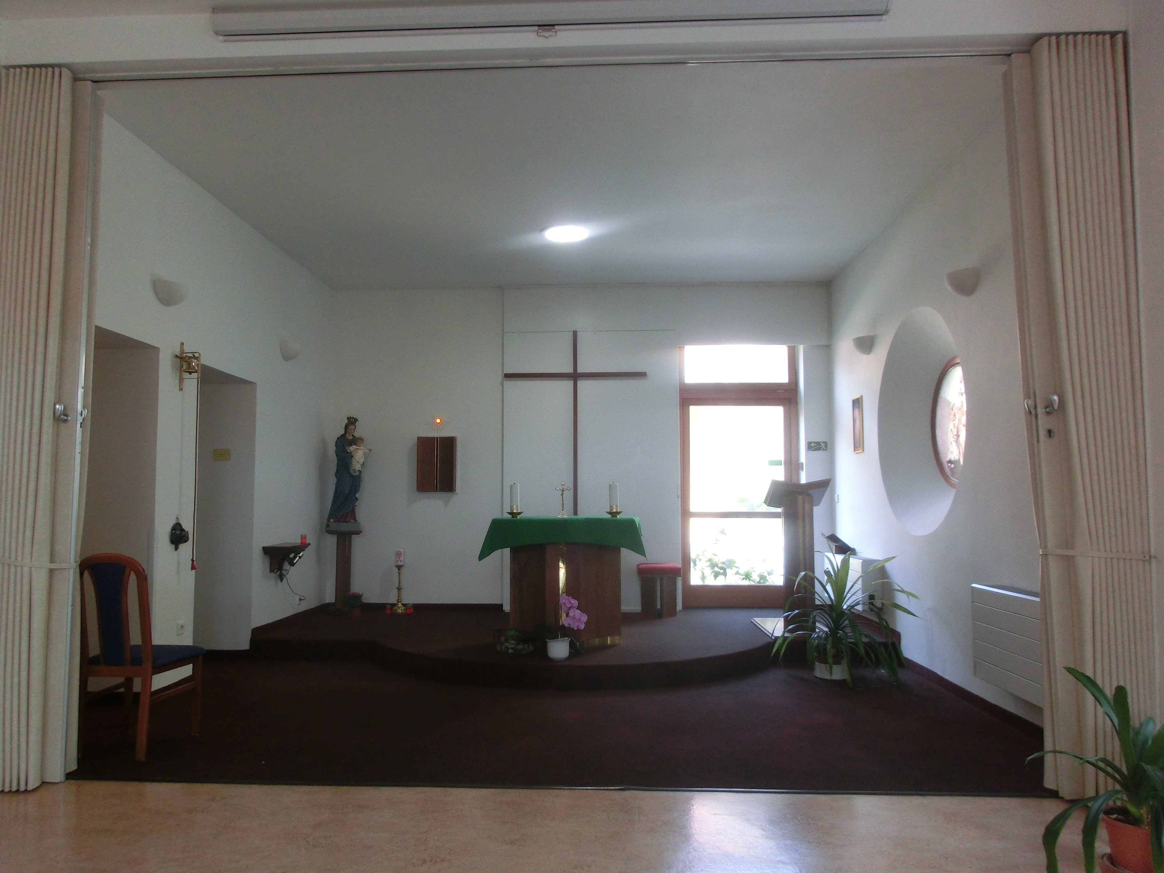 Kaple sv. Štěpána, Hospic, Litoměřice